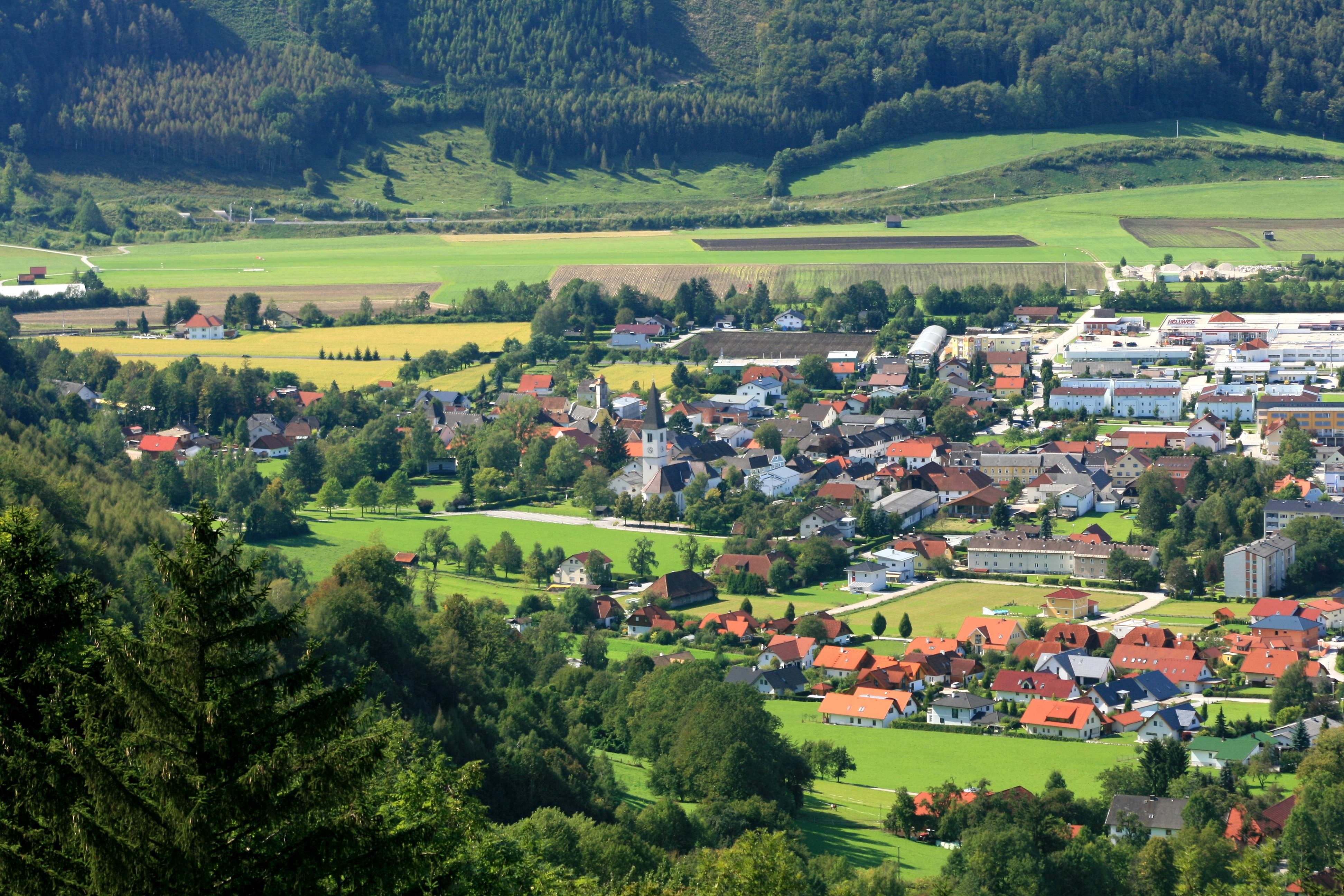 Ansicht der Marktgemeinde Micheldorf in Oberösterreich